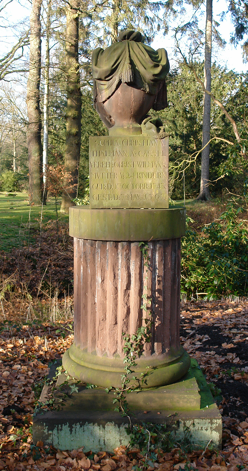 Osterholzer Friedhof in Bremen, Grabstein-Inschrift: SOPHIA CHRISTIANA THALMANN, A: CASSEL. VEREH:OBRIST WILMANS. MUTTER V:24 KINDERN: GEB:D.17 OCTOBR:1743. GEST:D: 7 MAY. 1797